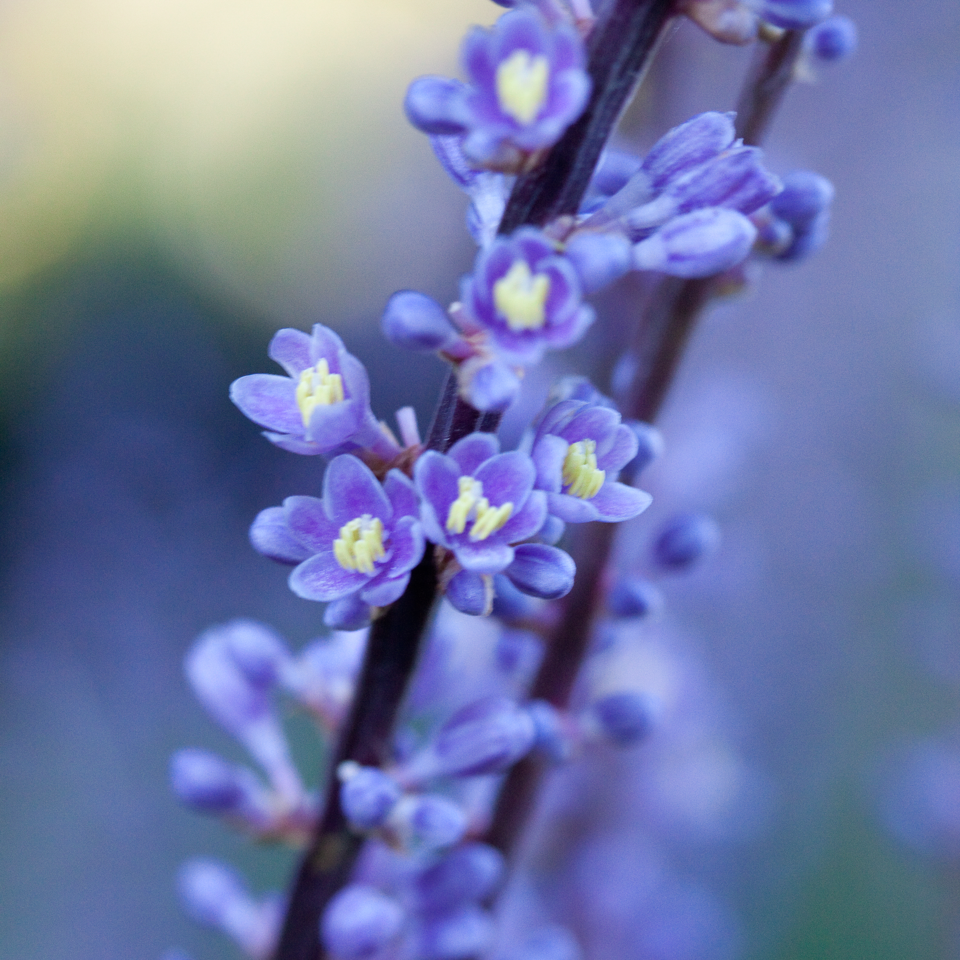 Fleurs de Liriope muscari - Jardin des Plantes - Paris - France